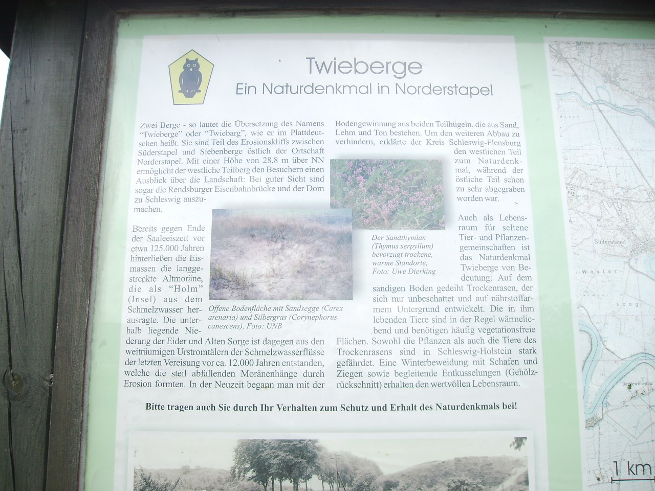 Infotafel am höchsten Punkt Stapelholms